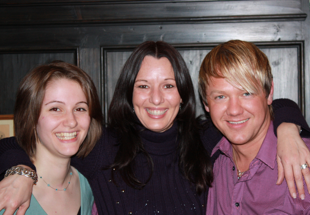 Anja Lukaseder zusammen mit Jürgen Meyer und Margit Plößner von Radio Ramasuri.